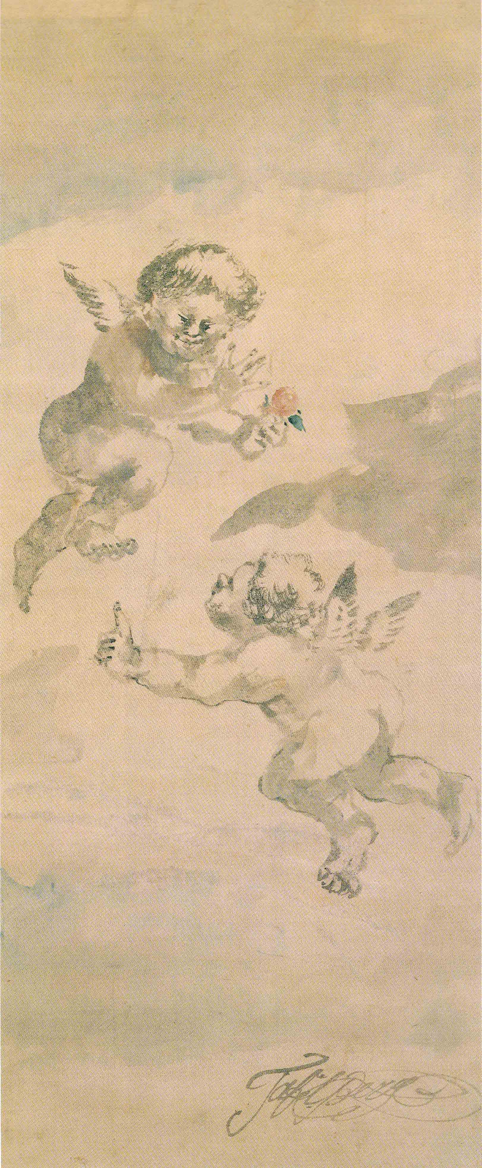 石川大浪-ターフェルベルグ天使図